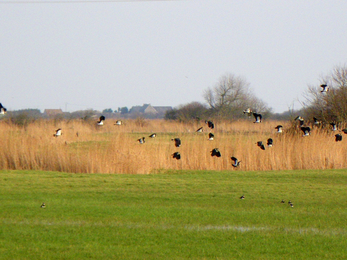 Les vanneaux Vanellus vanellus dans les marais inondés durant l'hiver.